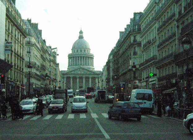 Paris - rue Soufflot - vue générale depuis le boulevard Saint-Michel, au fond le Panthéon